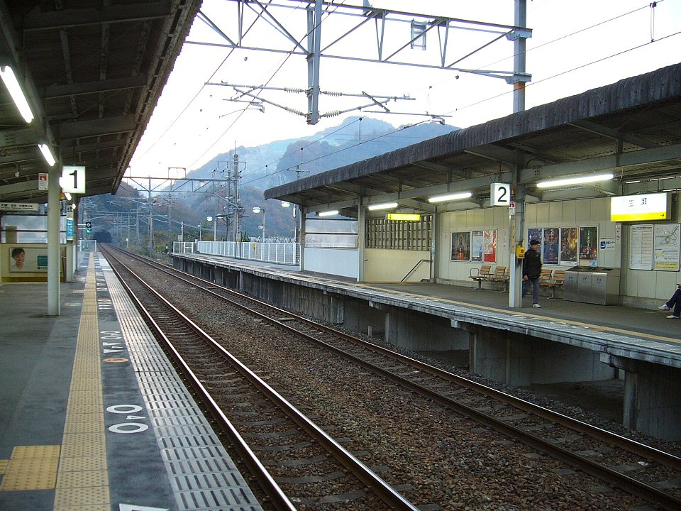 生瀬駅 1番ホームから構内を西望